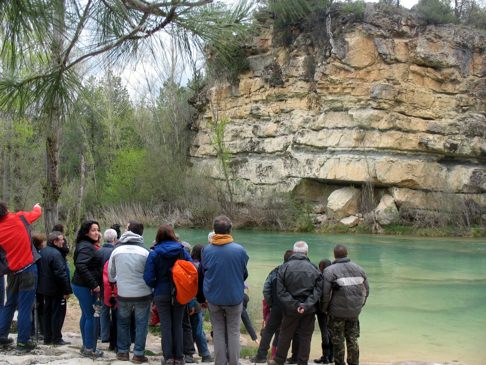 Explicación durante una de las paradas de la excursión geológica del Geolodía 16 de Guadalajara: Puente de San Pedro (Zaorejas, Guadalajara, España)